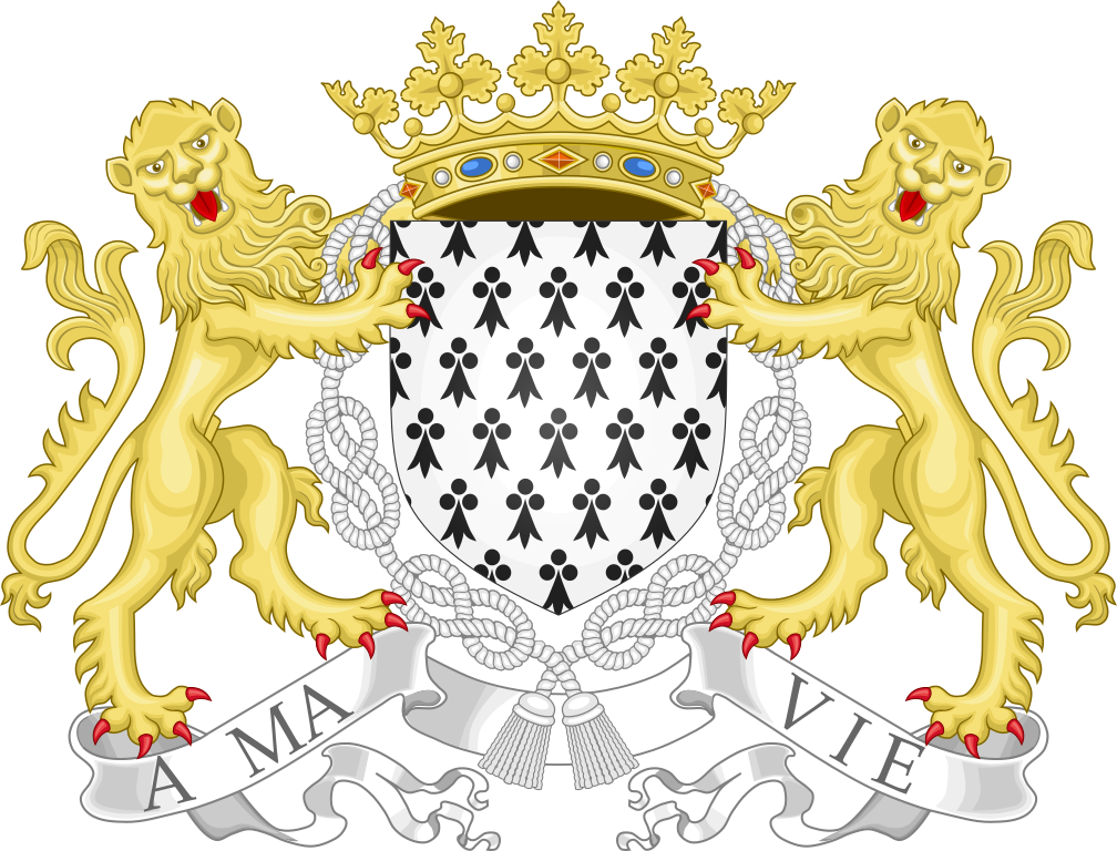 Armoiries du duché de Bretagne